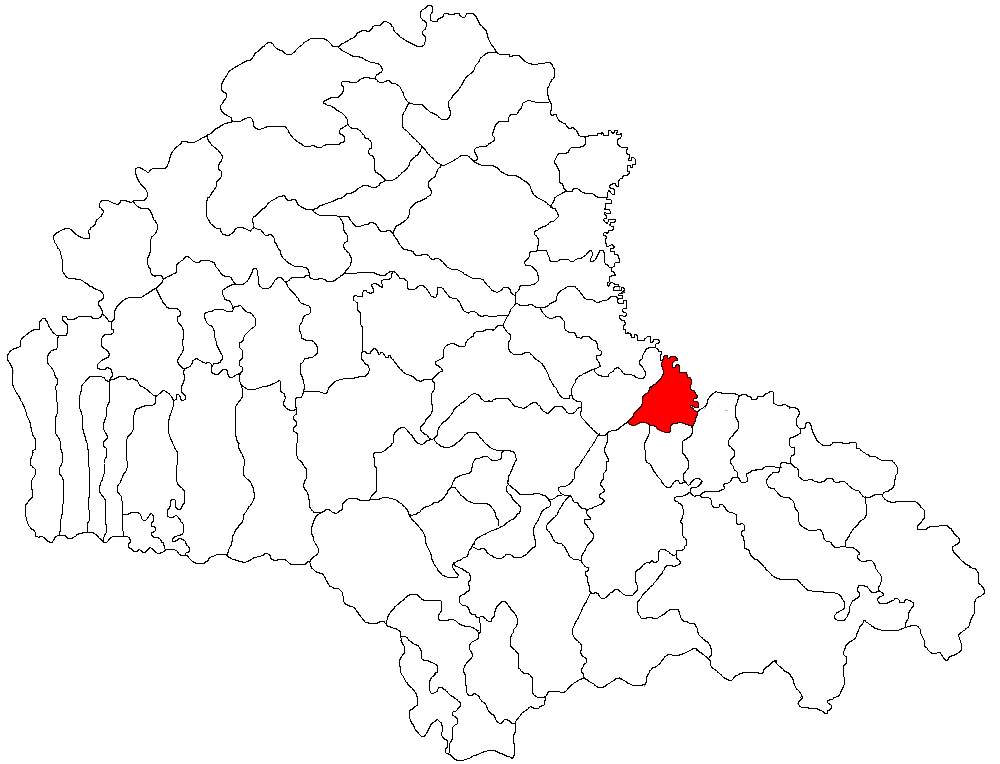 Categorie:Hărţi ale judeţului Braşov